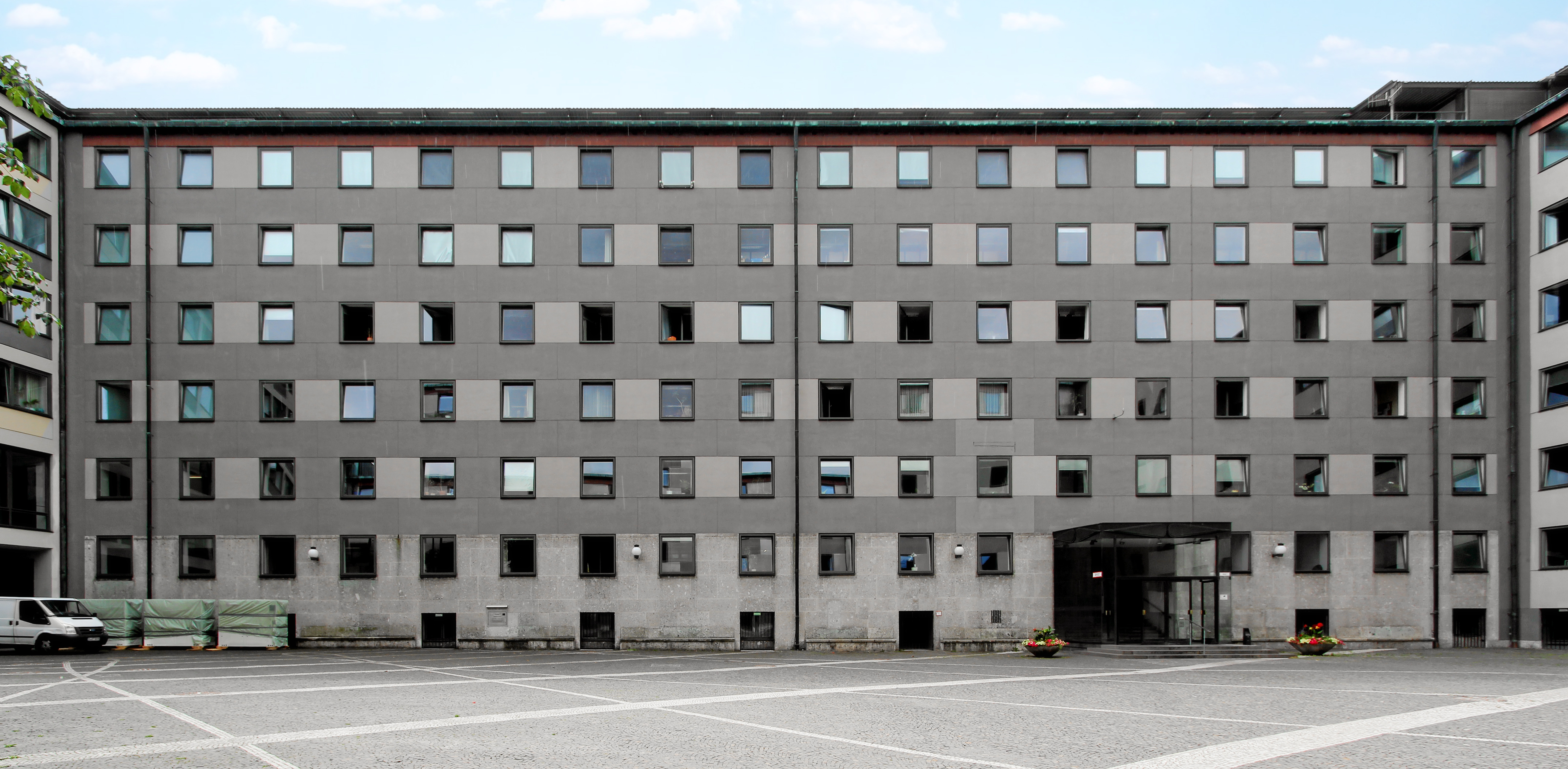 Innenhof des Deutsches Patent- und Markenamt in München